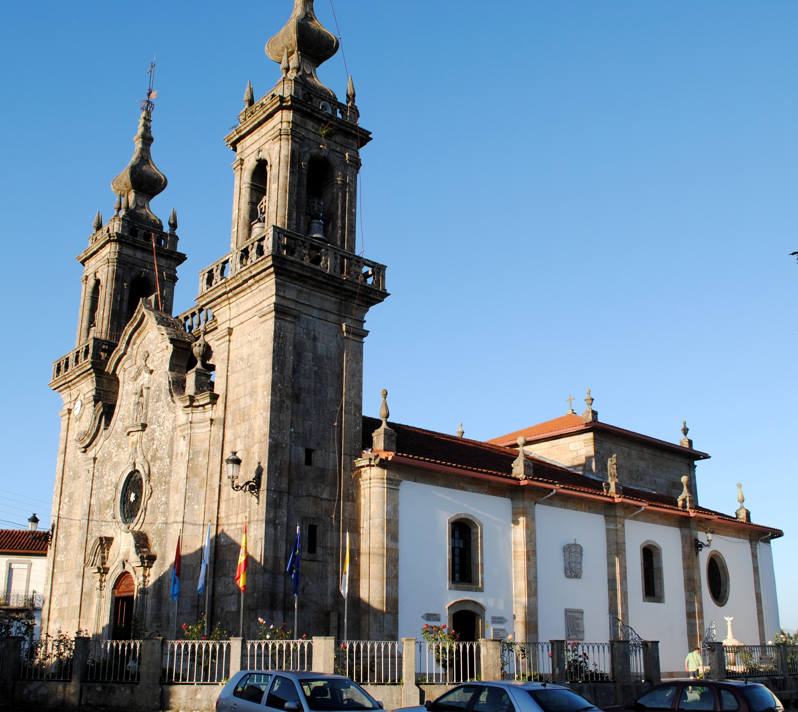 S. Martiño e S. Campio de Figueiró, igrexa parroquial